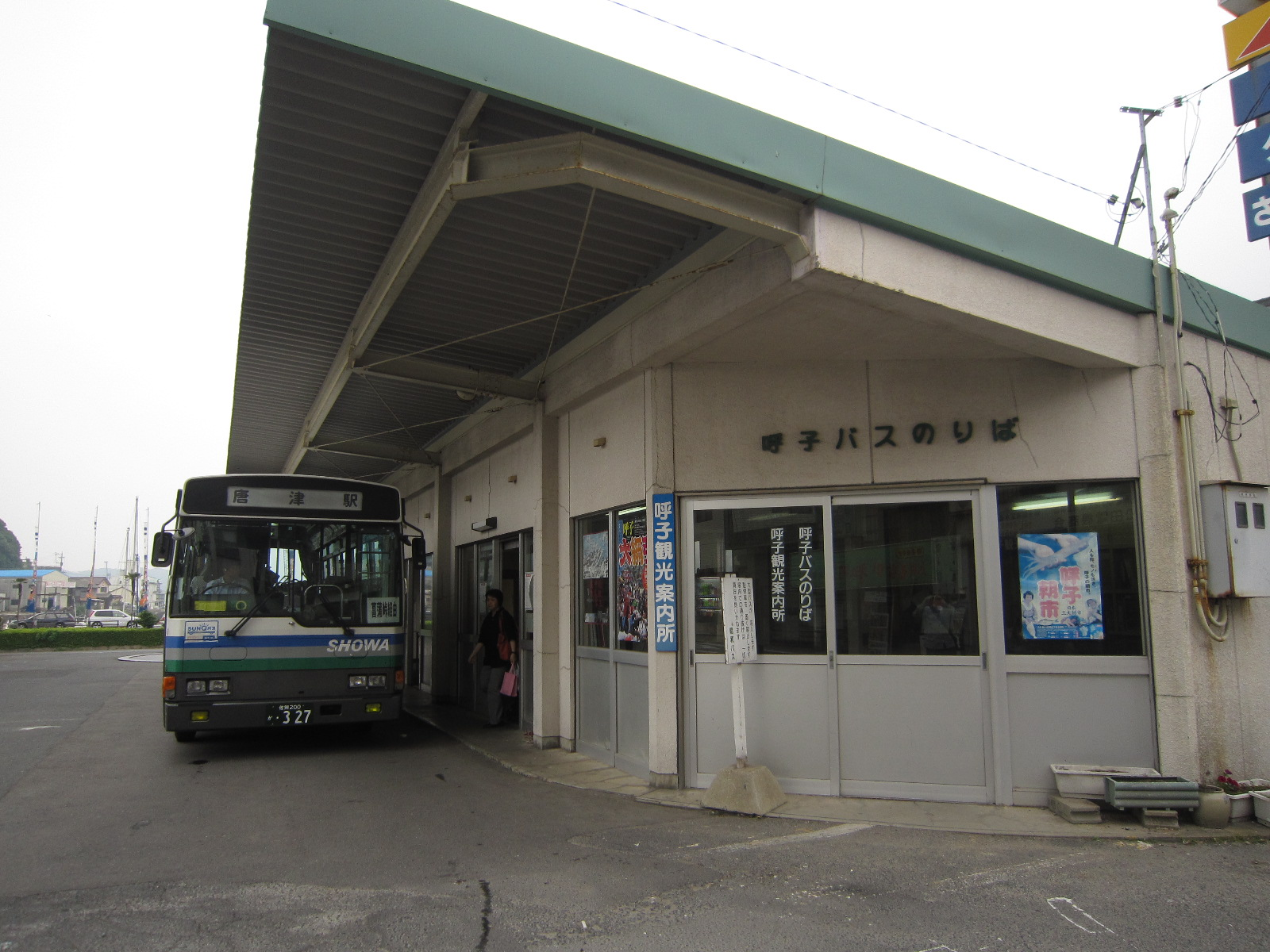 昭和バスの呼子待合所。